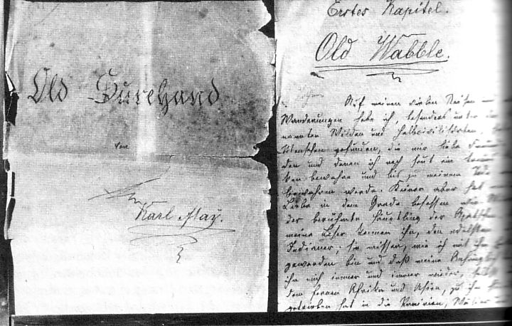 Der Beginn der ersten Bandes des Old-Surehand-Zyklus. Scan eines der wenigen erhaltenen Manuskripte Karl Mays.